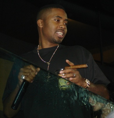 Nasir Jones